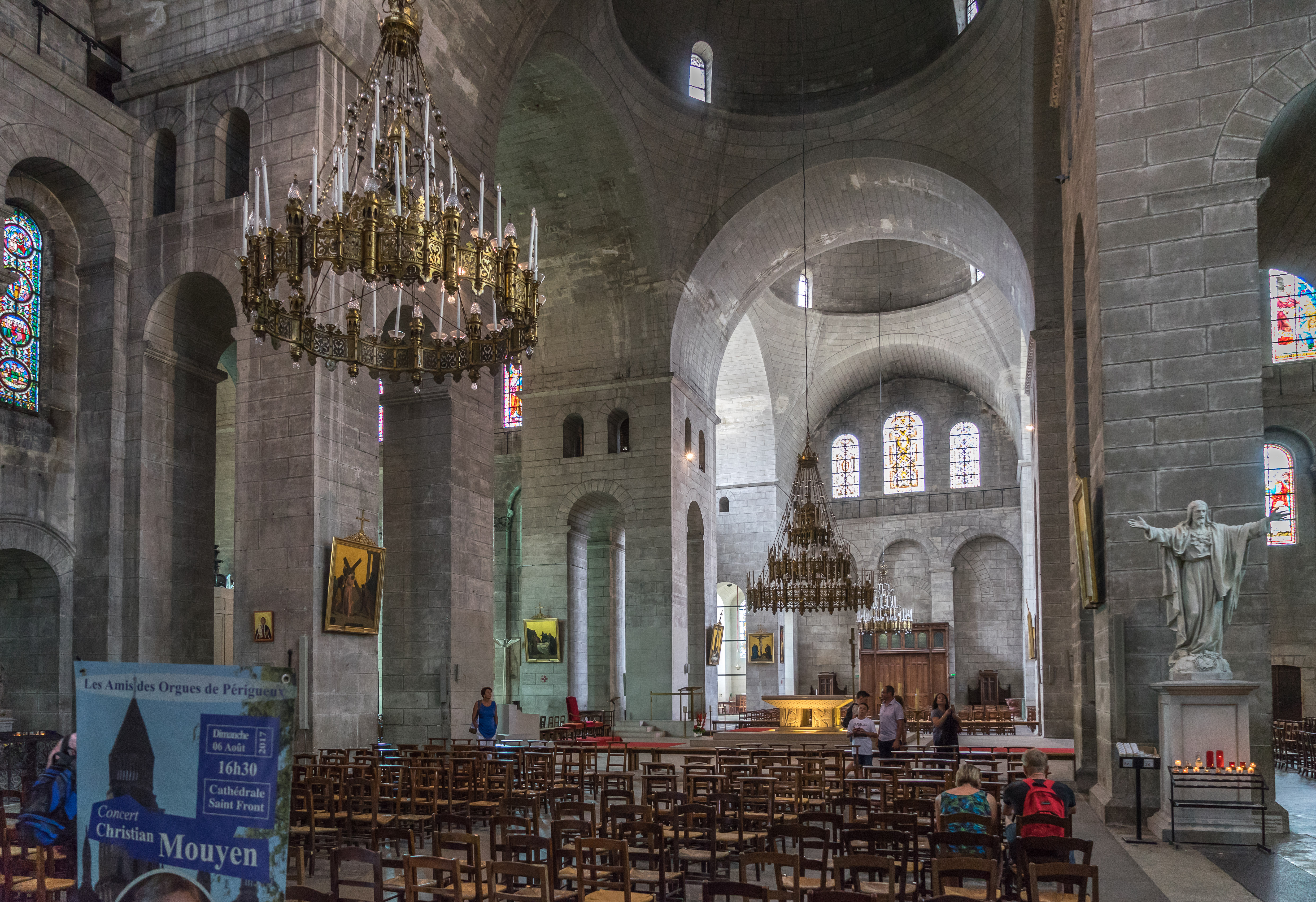 Périgueux - Saint-Front - Intérieur